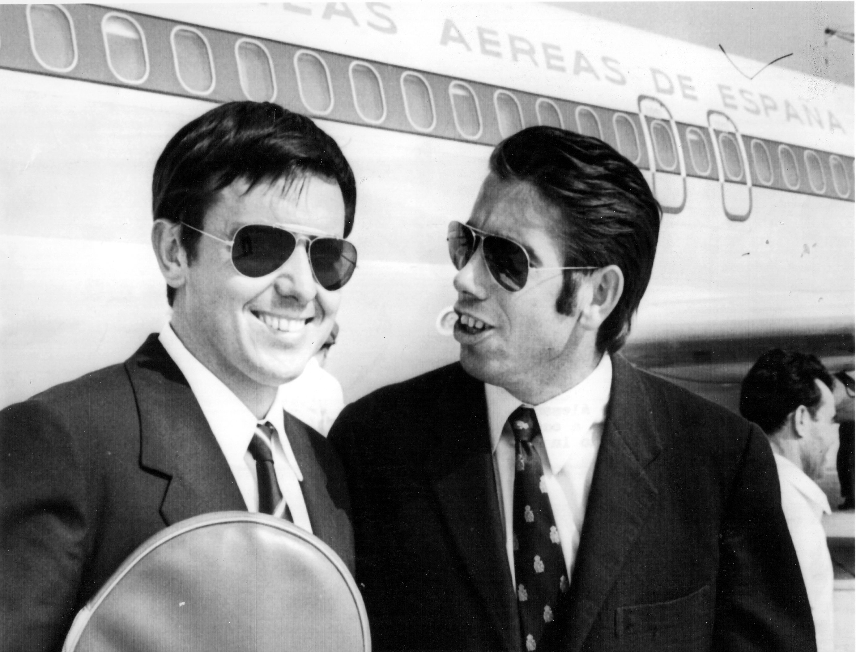 Jose Luis Arilla y Manolo Santan, en su camino a Dusseldorf para jugar su partido de dobles de la Copa Davis contra Estados Unidos.